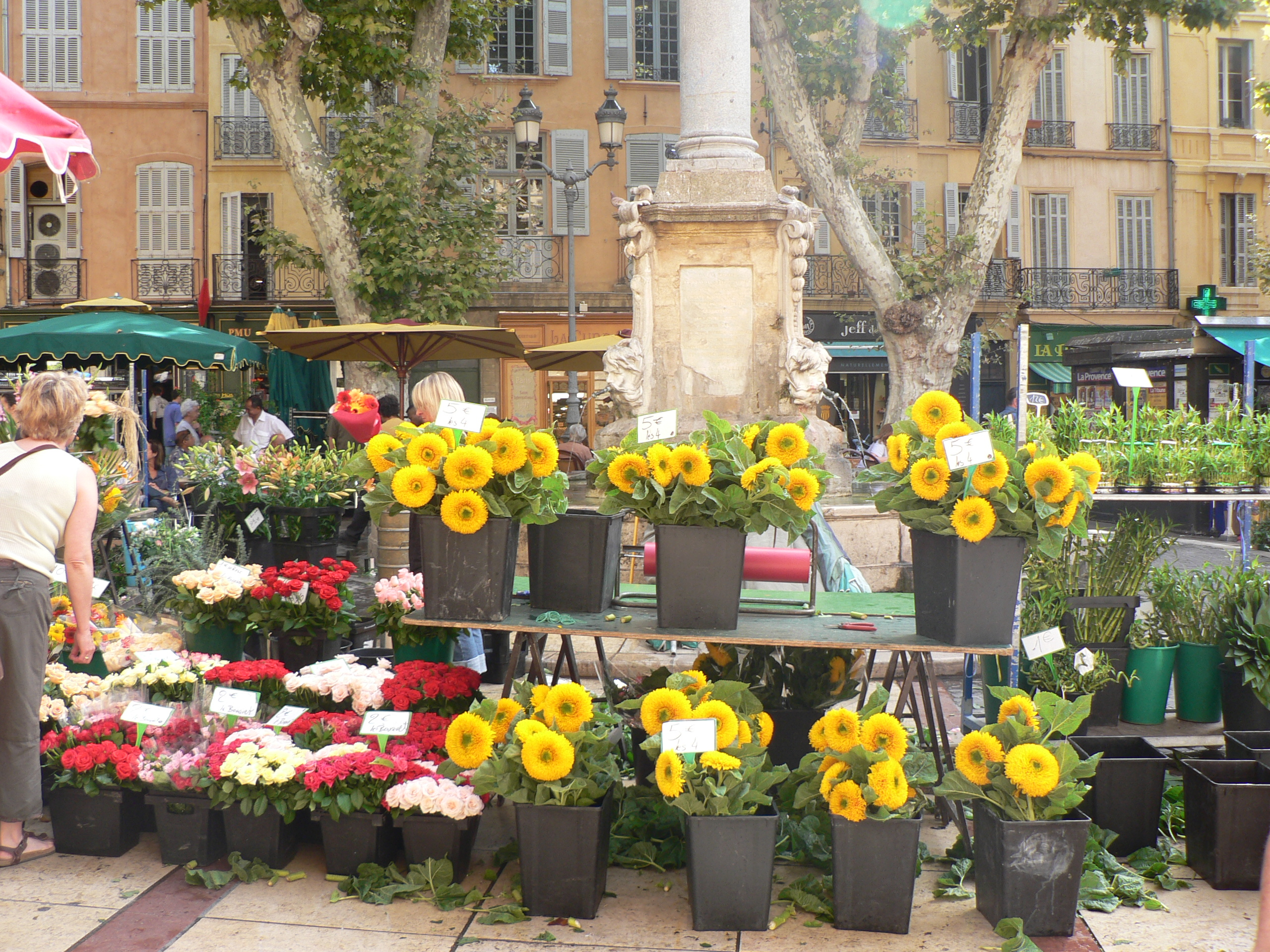 Place de l'Hôtel-de-Ville, Aix-en-Provence (France)